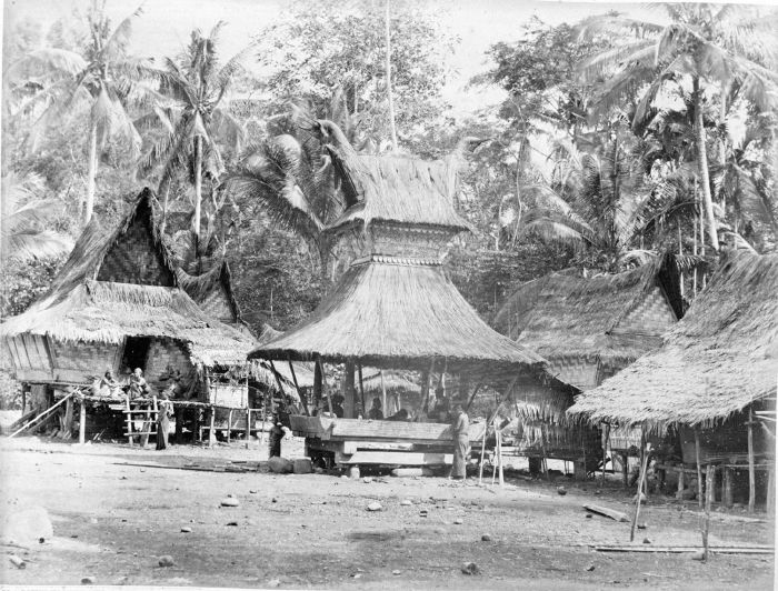 Foto. Dorpsgezicht met schedelhuis van de Batakkers in kampong Blintang.